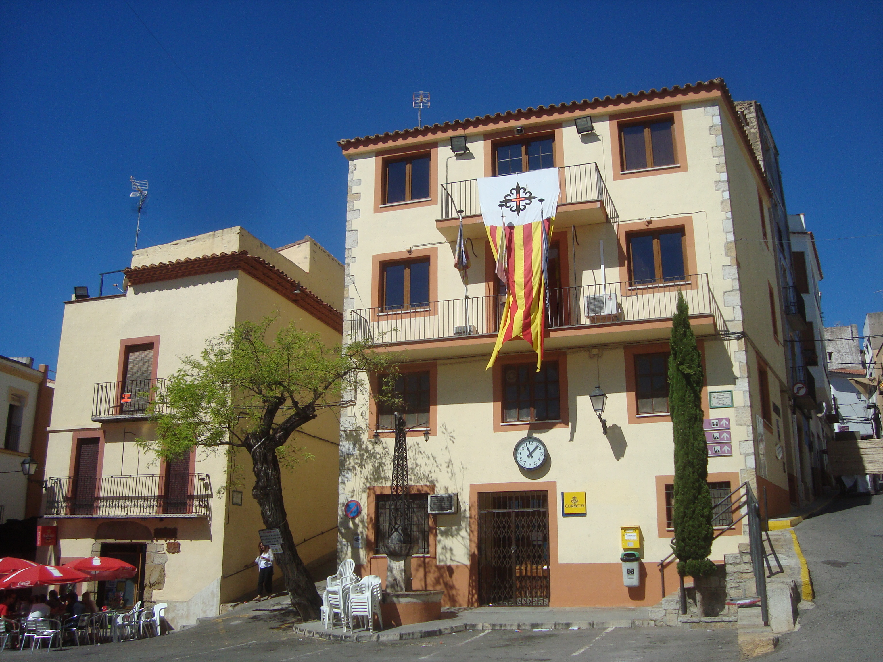 Ayuntamiento de Cervera del Maestrazgo